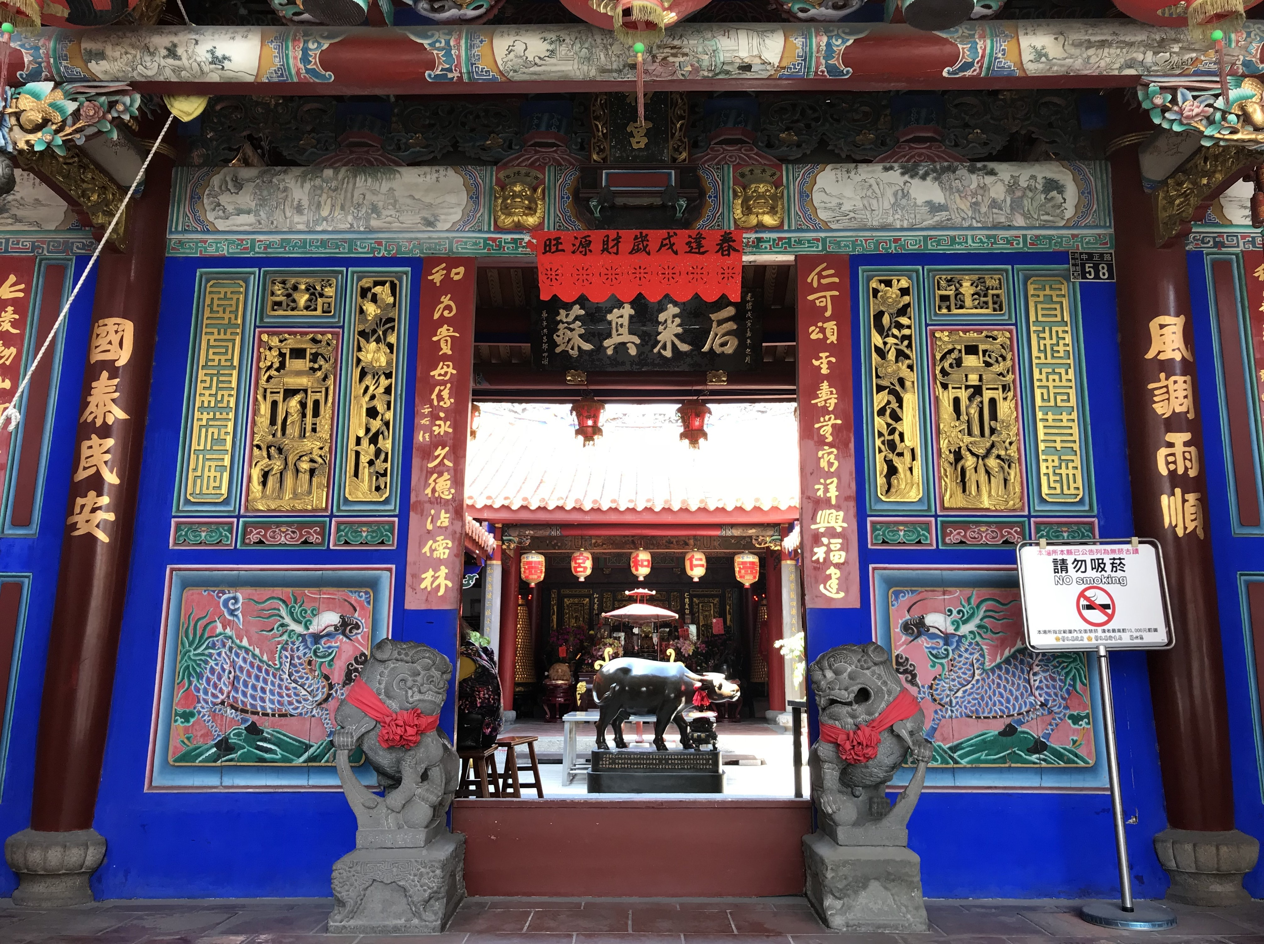 二林仁和宮大門與嘉慶年間匾額